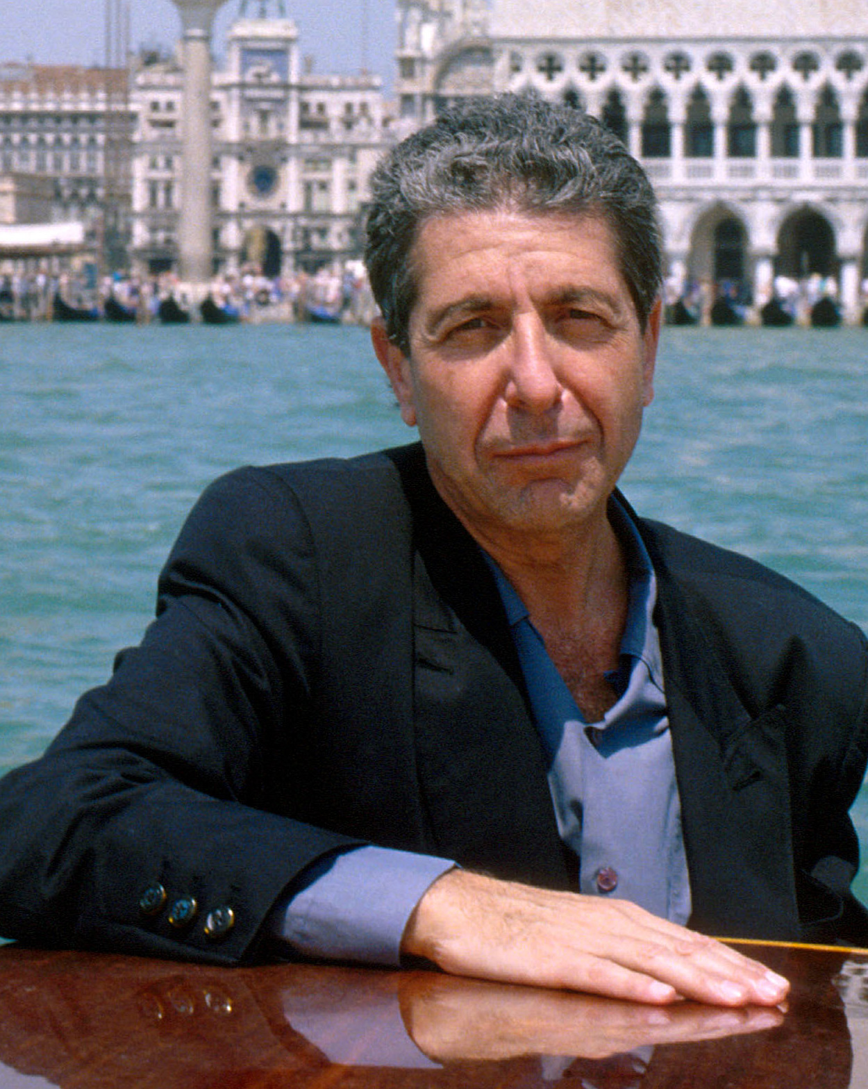 Il cantautore Leonard Cohen a Venezia